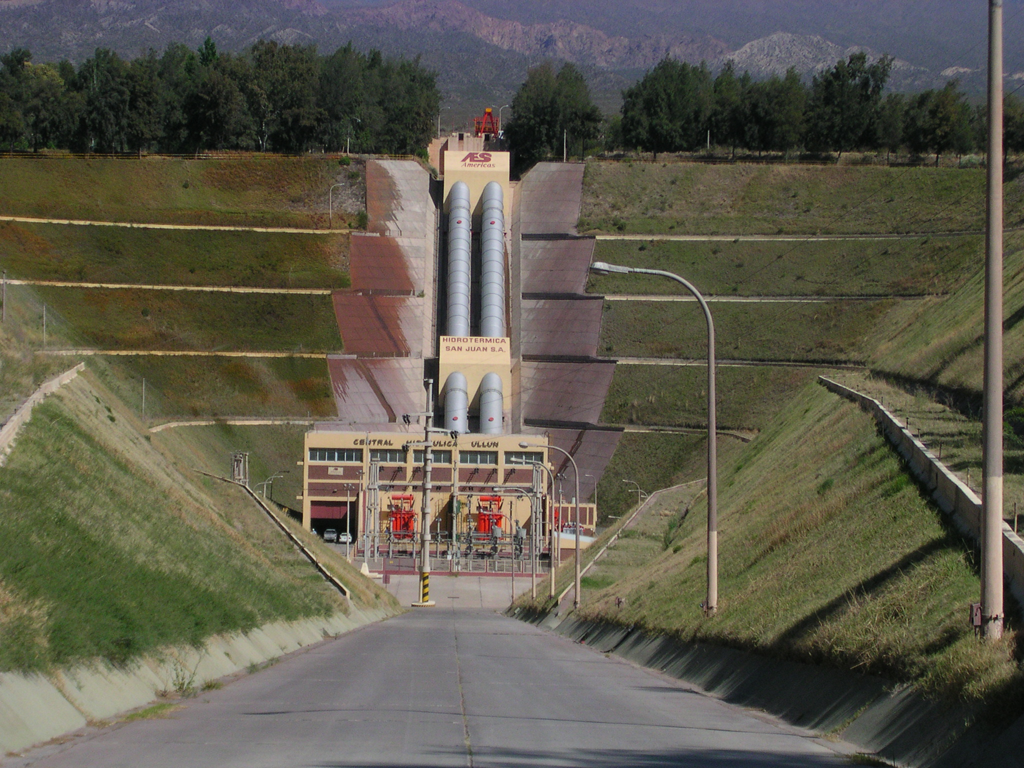 Central Hiidroeleéctrica Ullum I y II, en el departamento Ullum, provincia de San Juan, Argentina.